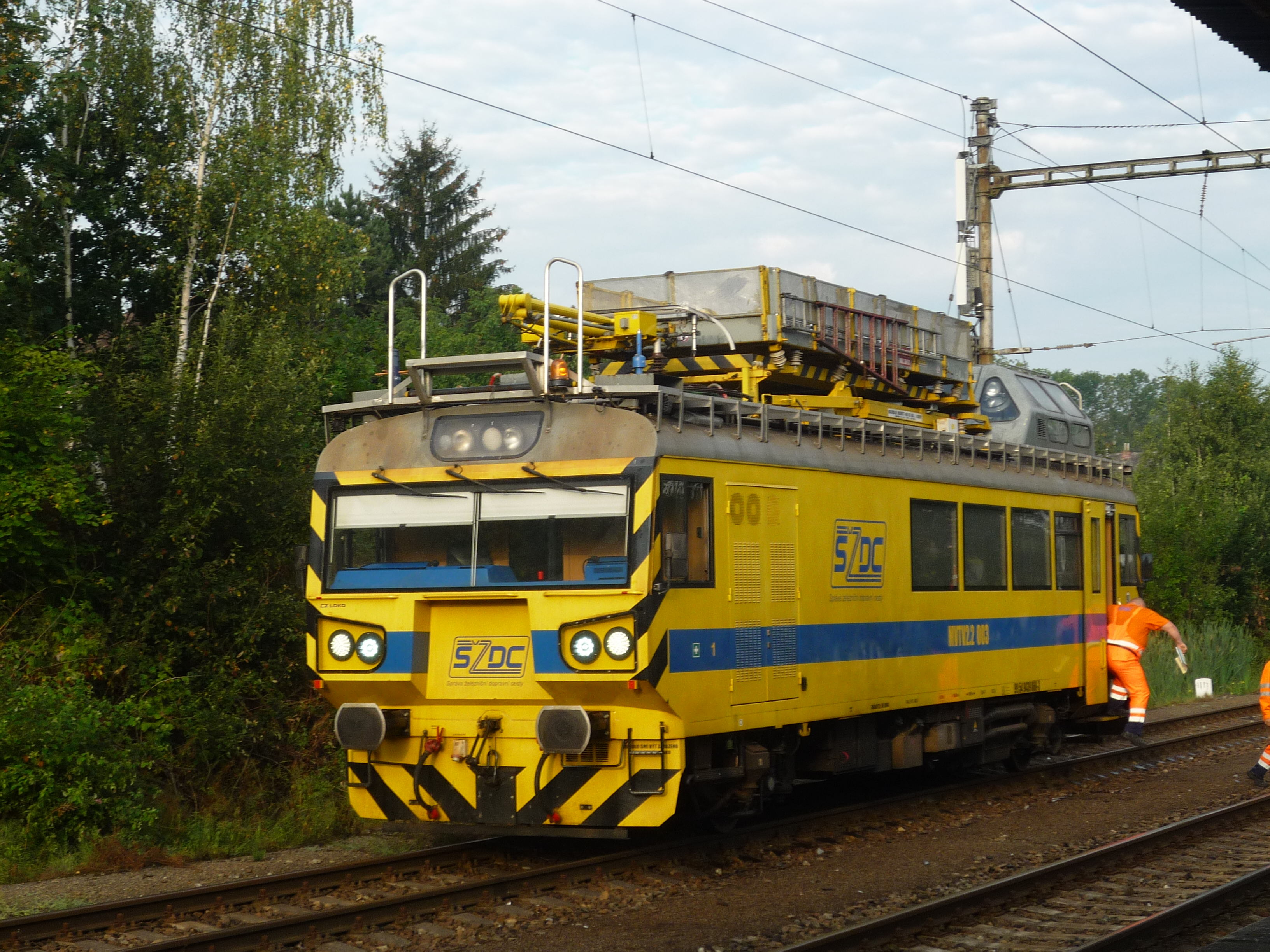 Autor fotografie a videa. Správa železniční dopravní cesty provozuje 66 dvounápravových vozů řady MVTV 2 a rozhodla se přizpůsobit část z nich současným provozním i pracovním požadavkům. Sériová výroba řady M 153.0/892 skončila v roce 1992 a po důkladné modernizaci mohou vozy, určené pro údržbu a opravy trolejového vedení, sloužit ještě dlouhá léta. Montážní vůz trakčního vedení MVTV 2.2 003 .Stanice Pohled. Okr. Havlíčkův Brod. Kraj Vysočina. Czech Republic.